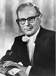 Jerry Högstedt